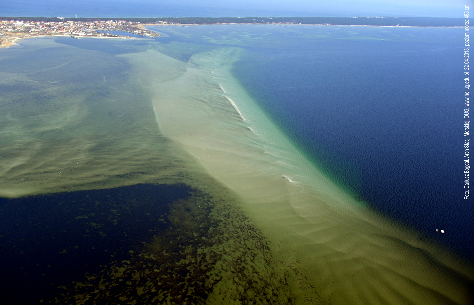 Widok Ryfu Fok wyłaniającego się z dna Zatoki Puckiej. Fotografia wykonana z wysokości 485 cm nad poziomem morza